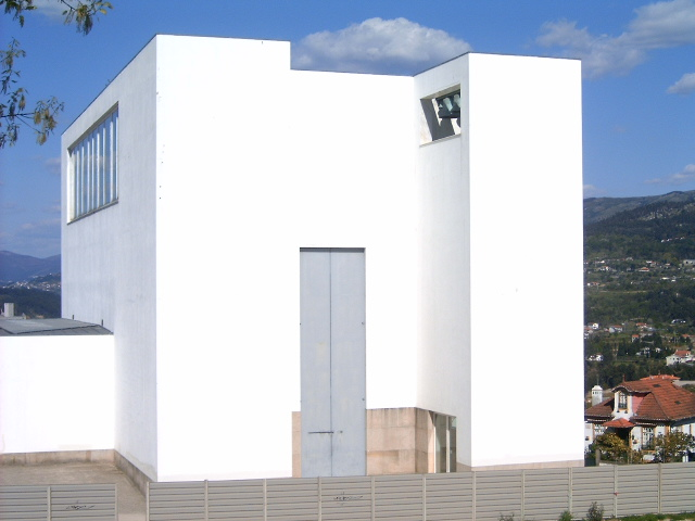 Marco de Canavezes Church by Alvaro Siza Vieira